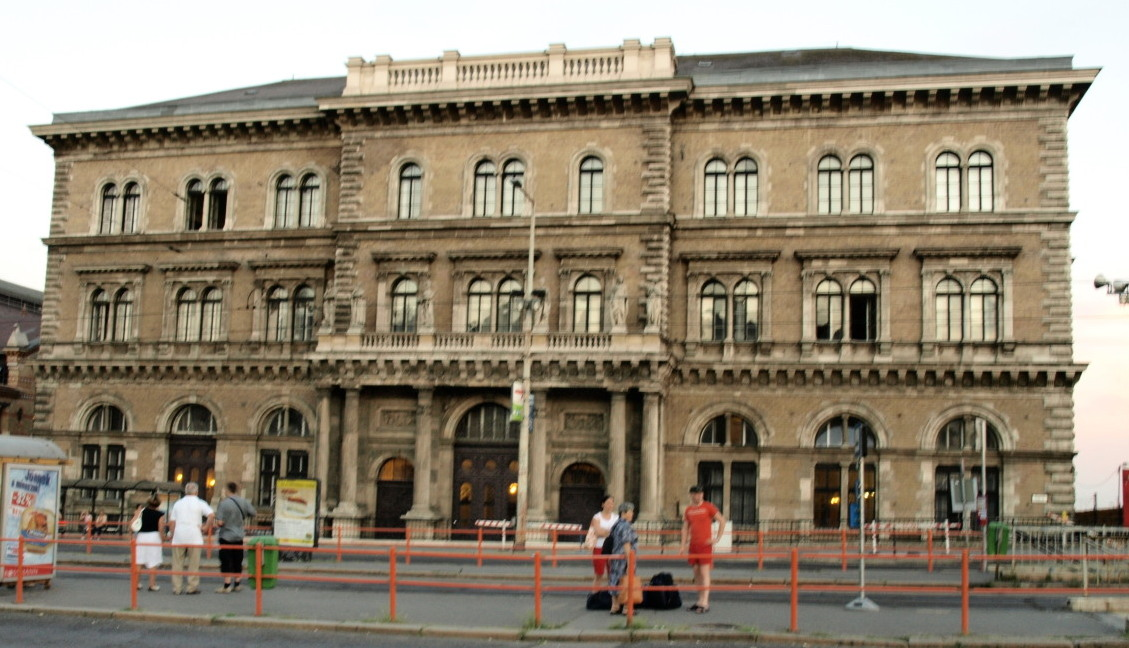 Budapest, Corvinus Egyetem, a Vámház körút felől, V. kerület